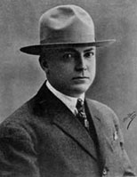 Cláudio Filipe de Oliveira Basto (Viana do Castelo, 23-08-1886 - Carcavelos, 02-05-1945). Etnógrafo e filólogo.